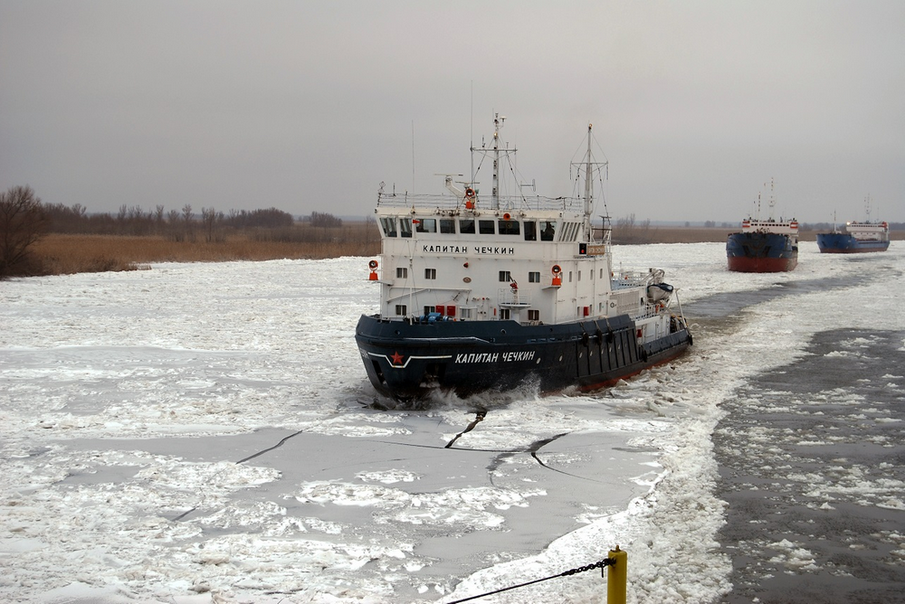 Volqa çayının deltalarından birinin qolu olan Baxtemir çayının dərinsulu hissələrindən birini və Xəzər dənizinin dərinsulu hissəsi ilə Volqa deltasının azsulu hissəsini birləşdirən kanal.